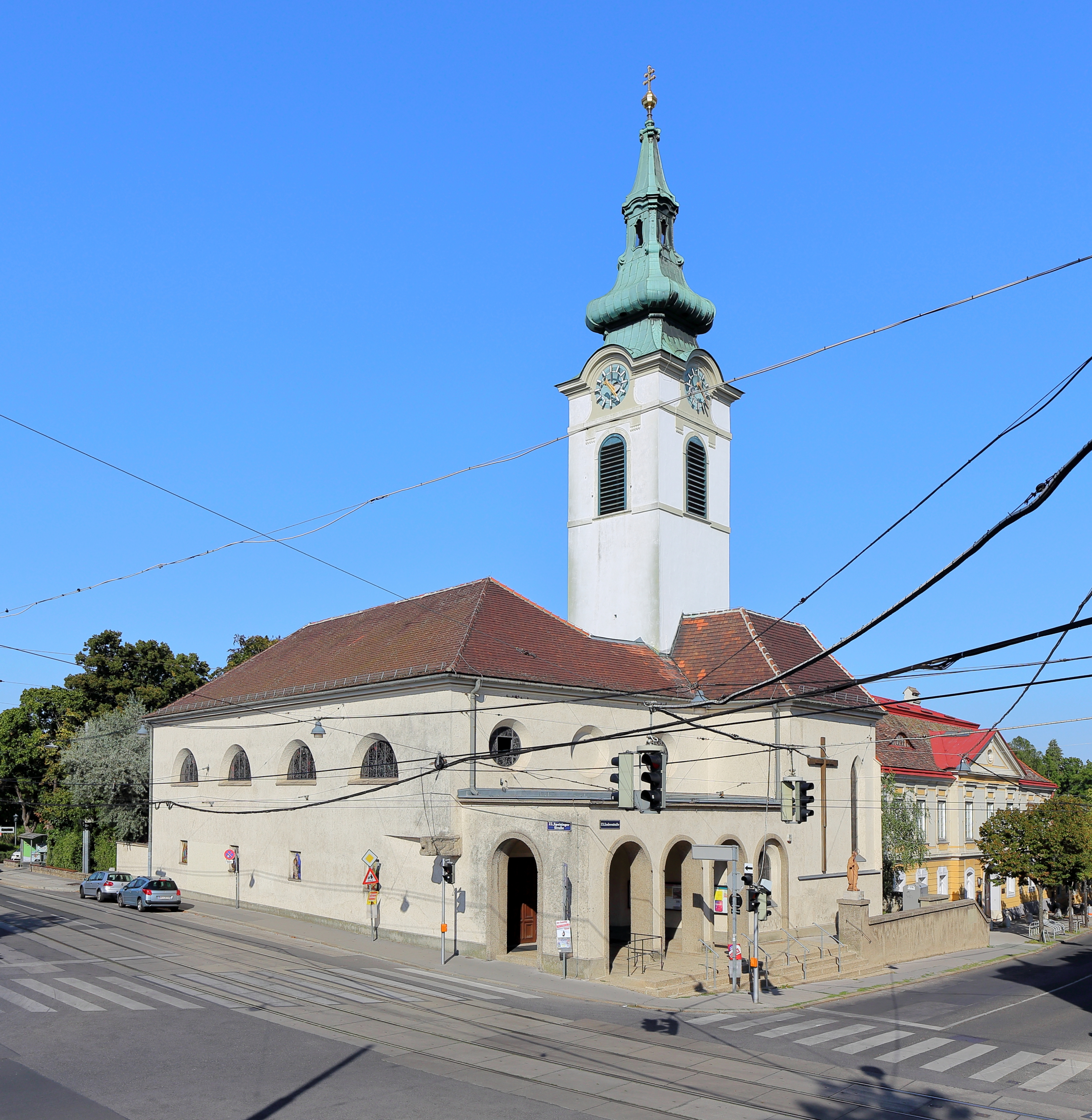 Südwestansicht der Pfarrkirche St. Erhard in Mauer, ein Ortsteil des 23. Wiener Gemeindebezirkes Liesing.Nachdem die alte Pfarrkirche zu klein und ein Hindernis für die neu erbaute Straßenbahn war, wurde die Kirche ab 1934 nach Plänen Clemens Holzmeisters umgebaut. Dabei wurde ein neues Langhaus in Nordsüdausrichtung errichtet und das alte mit der Ostwestausrichtung abgetragen. Der Turm, welcher noch aus der Erbauungszeit stammt, mit seinem Zwiebelhelm von 1770 und der gotische Chor blieben erhalten, wobei der Chor zur Erhardskapelle umgestaltet wurde. Am 14. November 1936 erfolgte die Weihung der neuen Kirche.